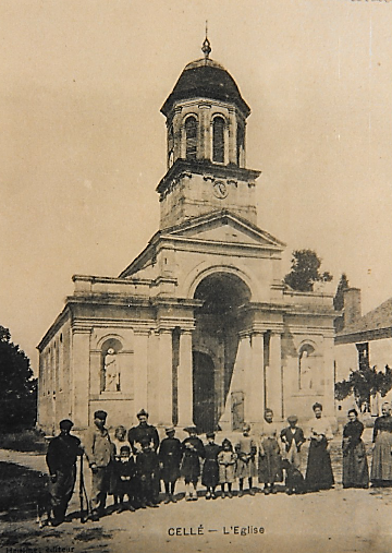 EGLISE DE CELLE